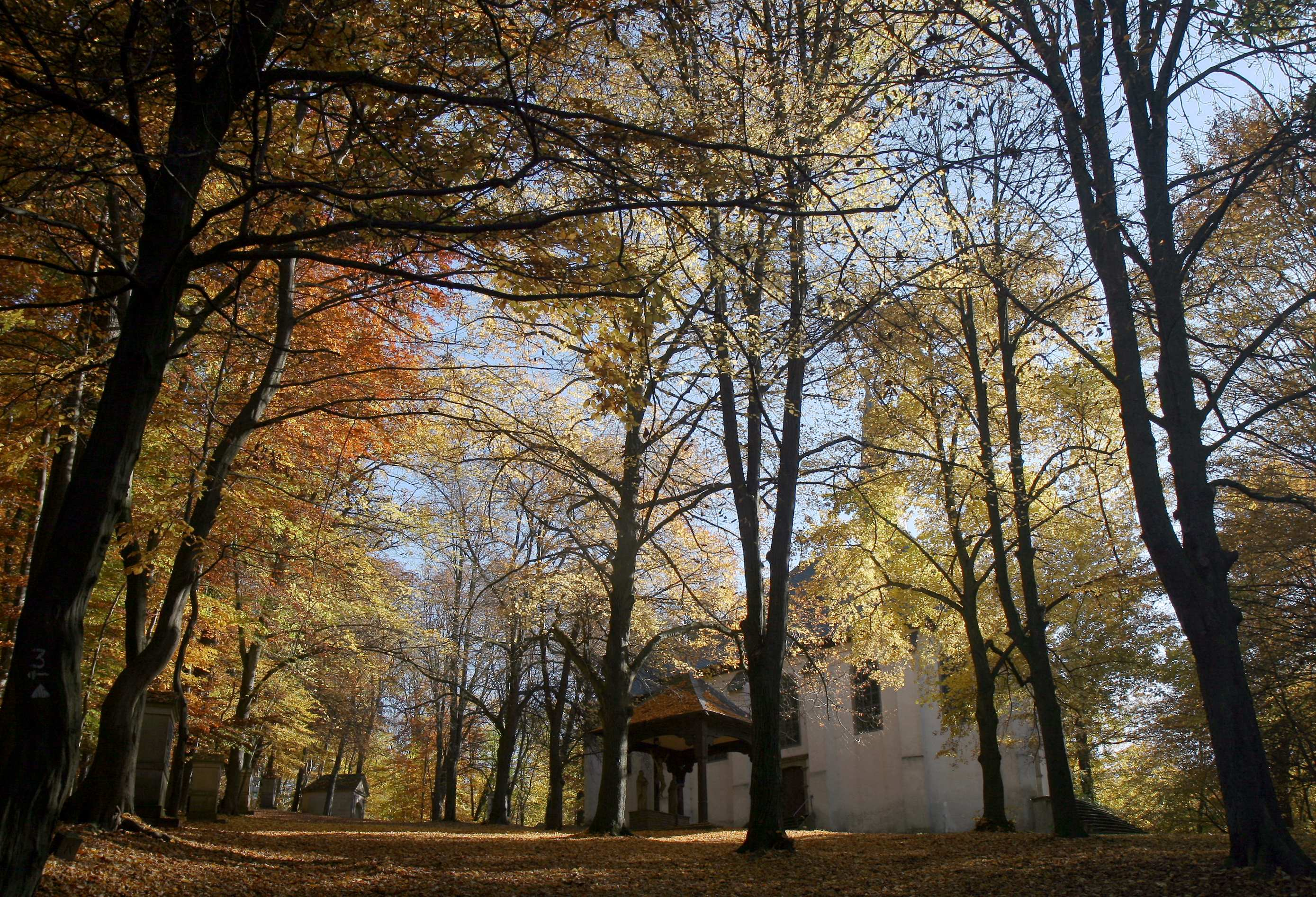 Kreuzweg auf dem Rodenberg in Menden, Rodenberg. This image shows a heritage building in Germany, located in the North Rhine-Westphalian city Menden (Sauerland) (no. 39).